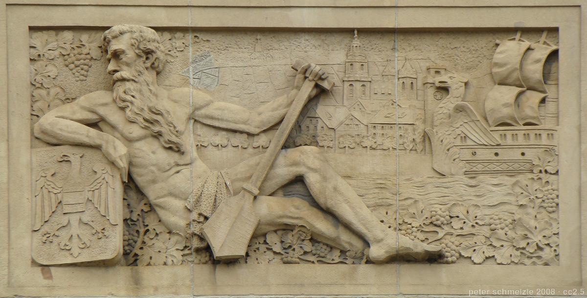 Fassadendetail vom historischen Postamt No.2 in Heilbronn